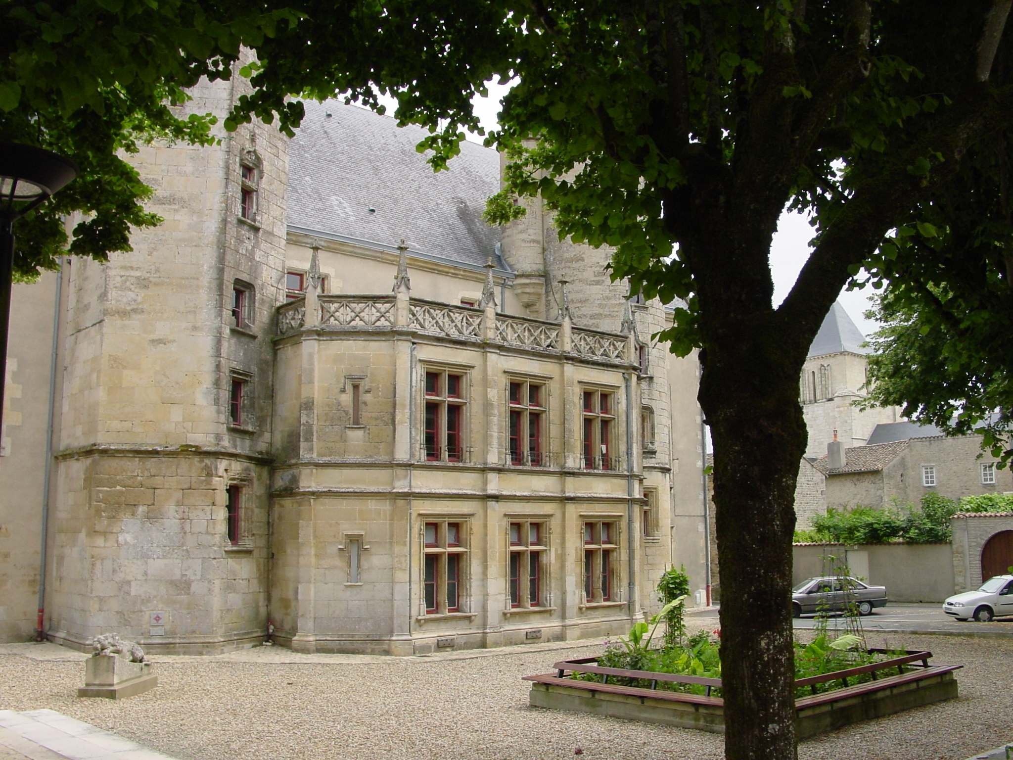 Ce bâtiment abritât le tribunal d'instance de Melle jusqu'en fin 2009, la salle des pas perdus sert de salle d'exposition, ainsi que le grenier.